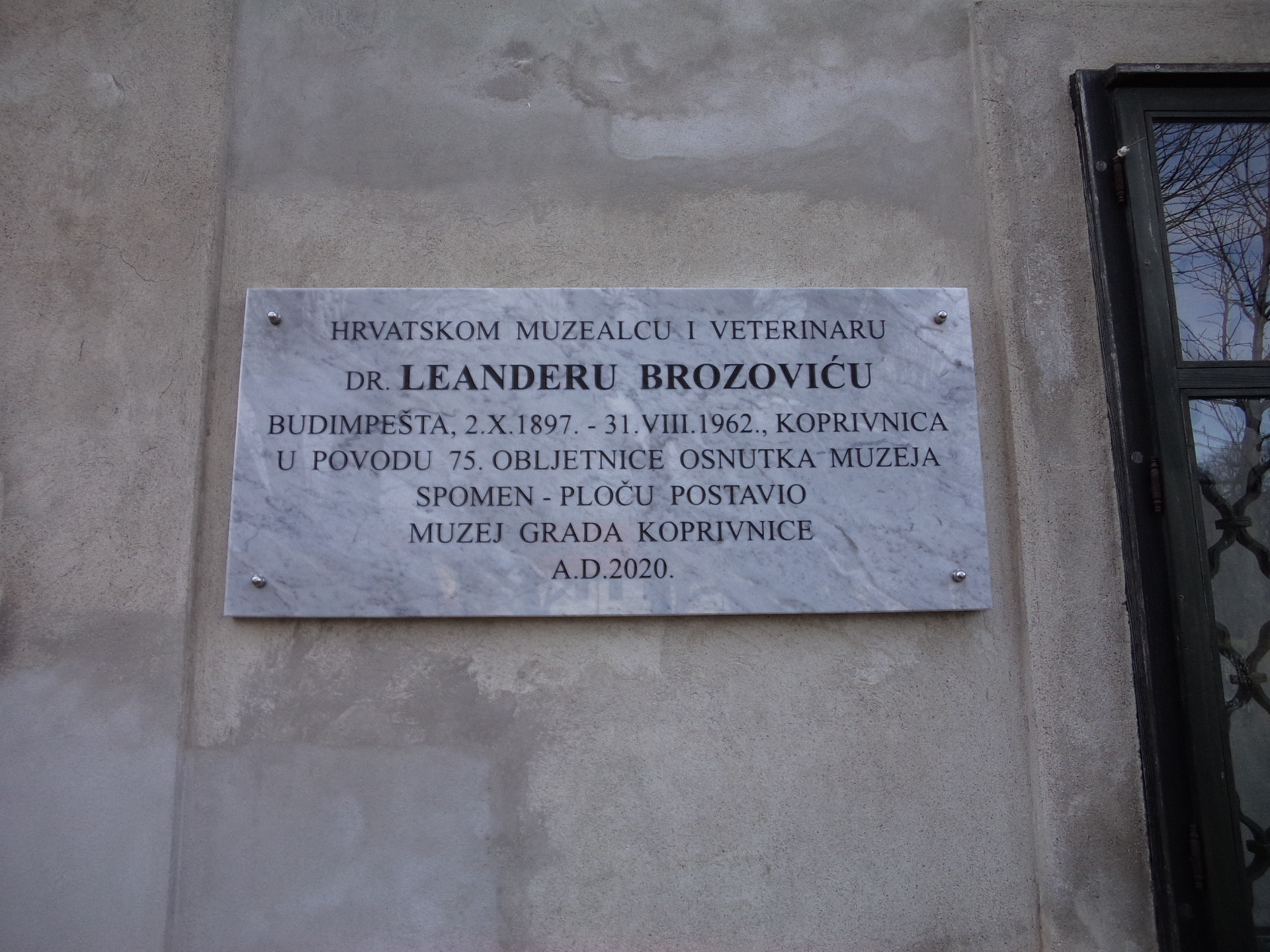 Kapronca, Brozović emléktábla